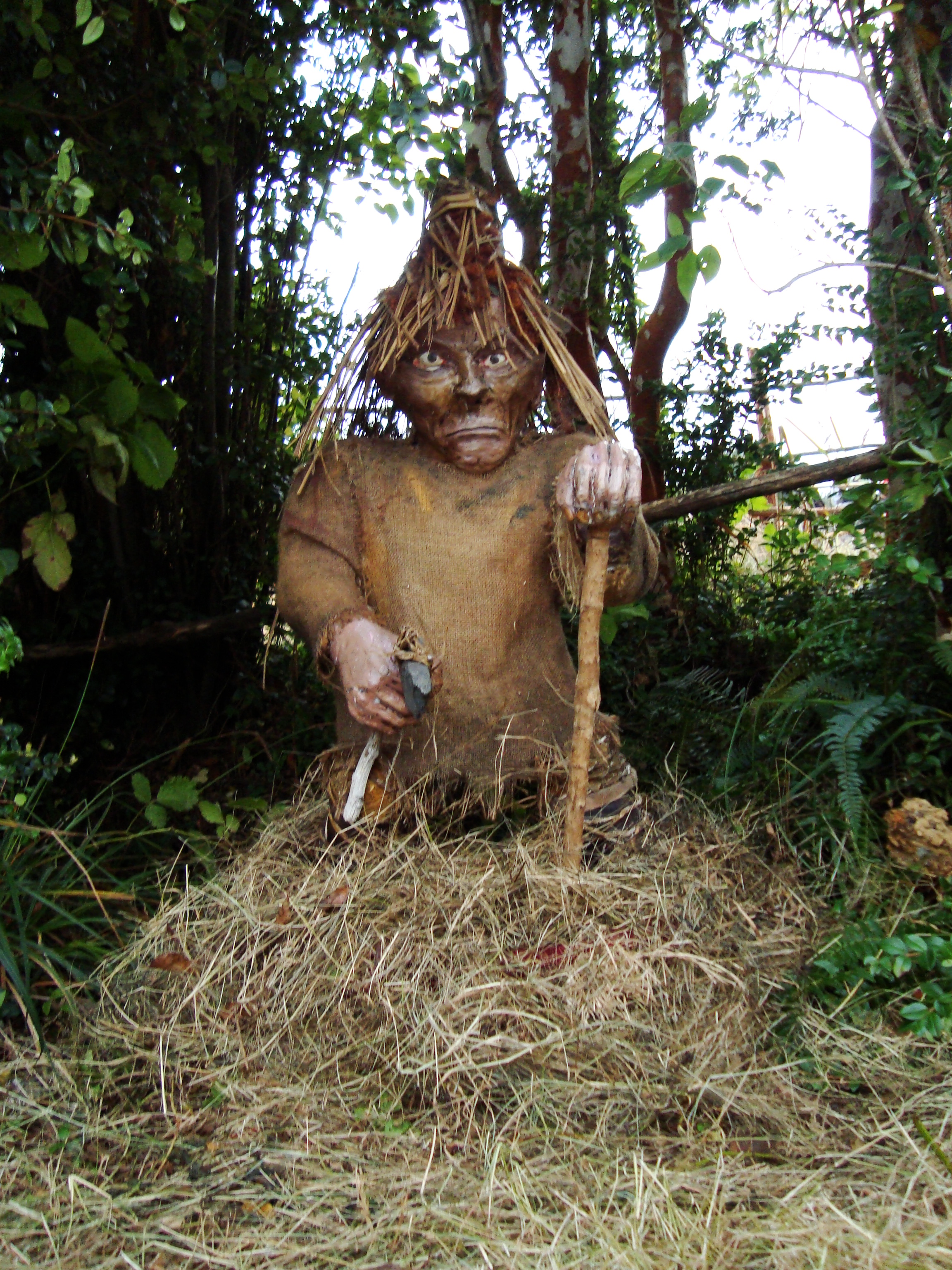 Representação do Trauco, ser mitológico de Chiloé. A figura encontra-se no "Rincão mitológico" do Parque Municipal de Castro, Chile.